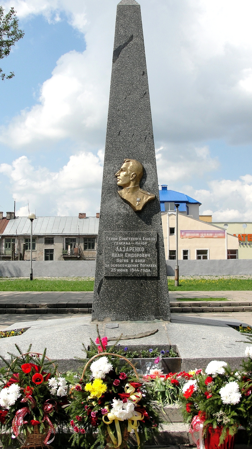 Памятник генералу-майору Лазаренко И.С.